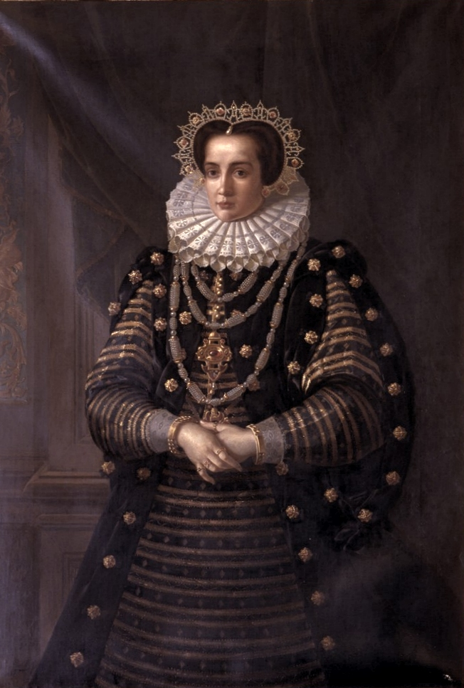 Portrait of Dorothea Maria von Sachsen-Weimar (1574-1617)